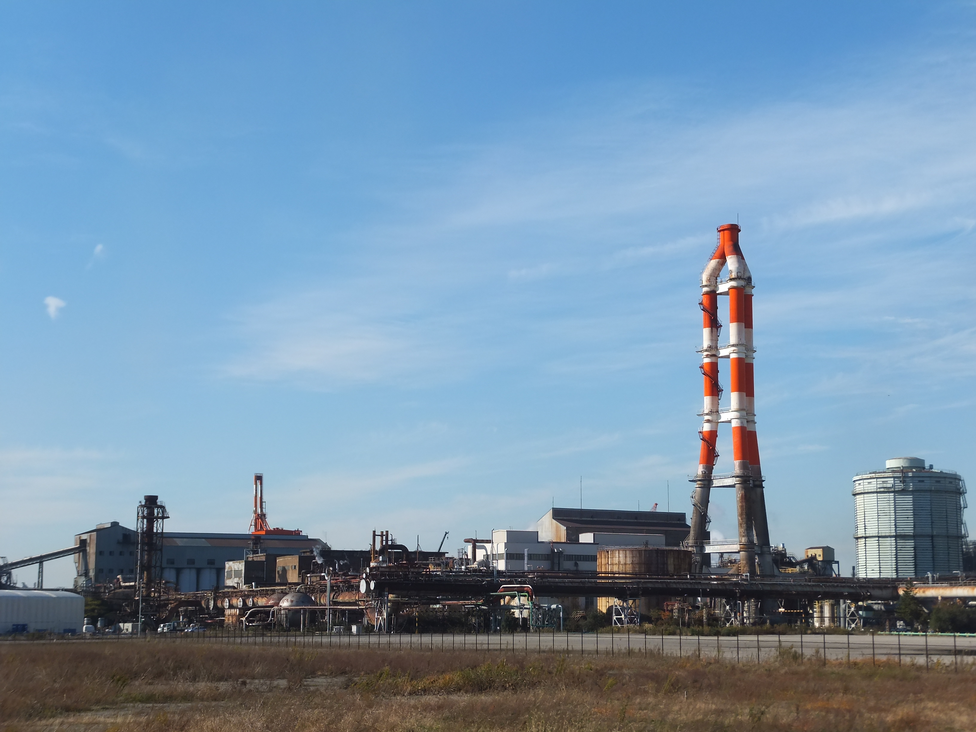 JFEスチール東日本製鉄所 千葉地区（旧・川崎製鉄千葉製鉄所; 千葉県千葉市）。フクダ電子アリーナより撮影